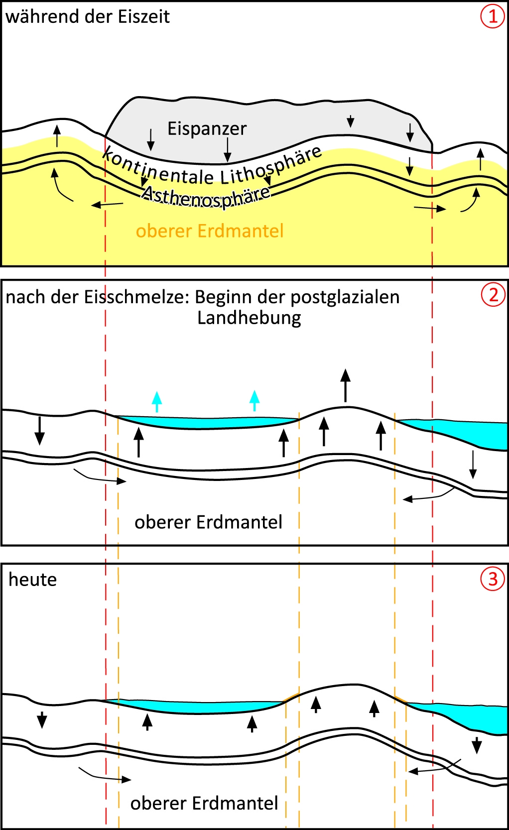 Grafik zeigt Ursachen und Ablauf der Postglazialen Landhebung